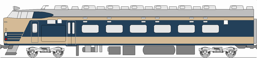 クハネ581形 側面